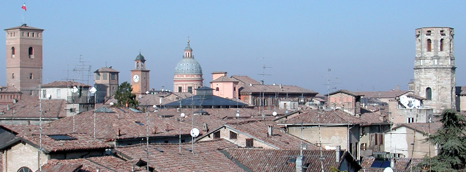 Reggio Emilia Italy panorama profilo della città panorama and skyline from left: torre del bordello, torre di palazzo del monte, cupola del duomo, torre di San Prospero. author:Paolo da Reggio